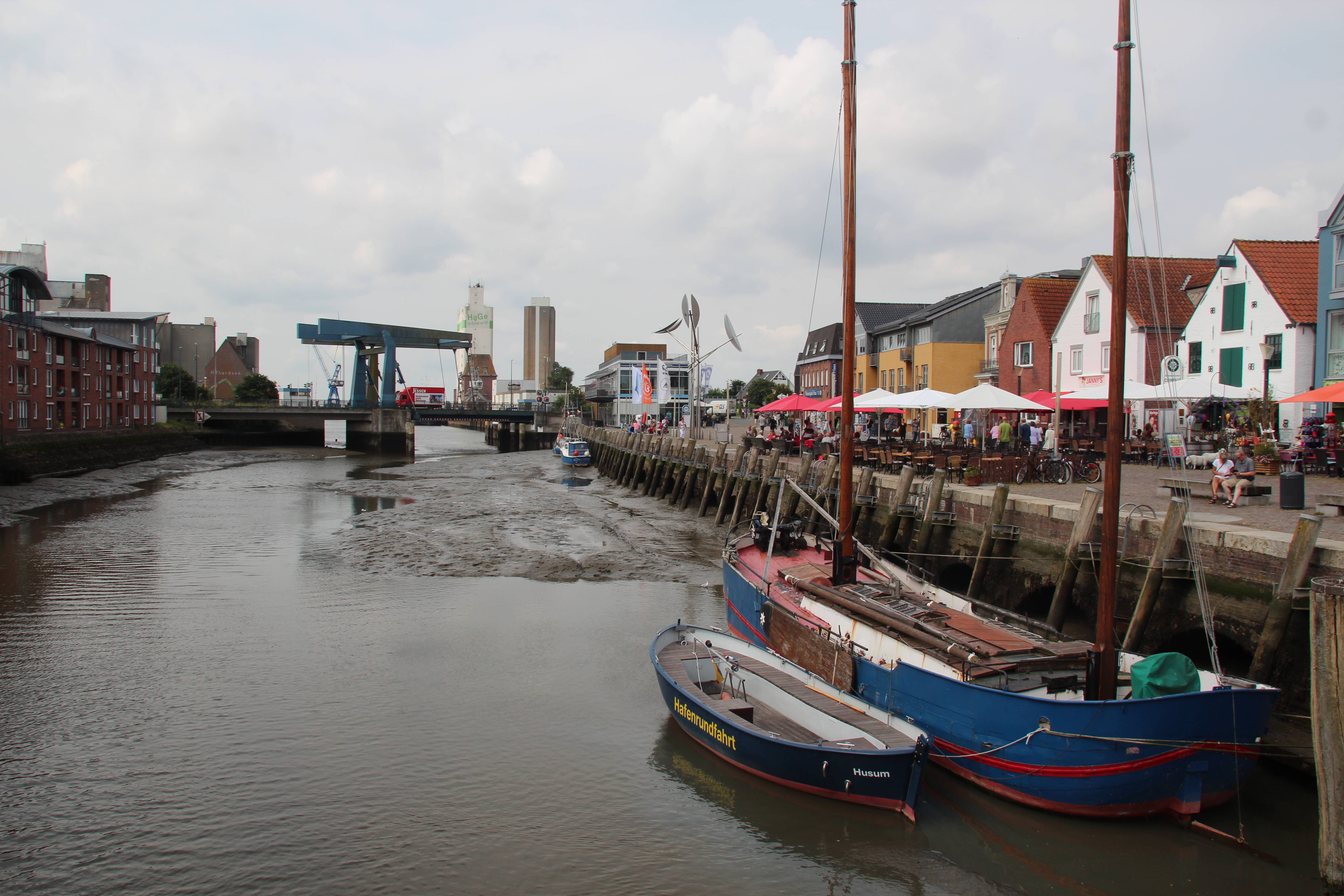 Husum havn